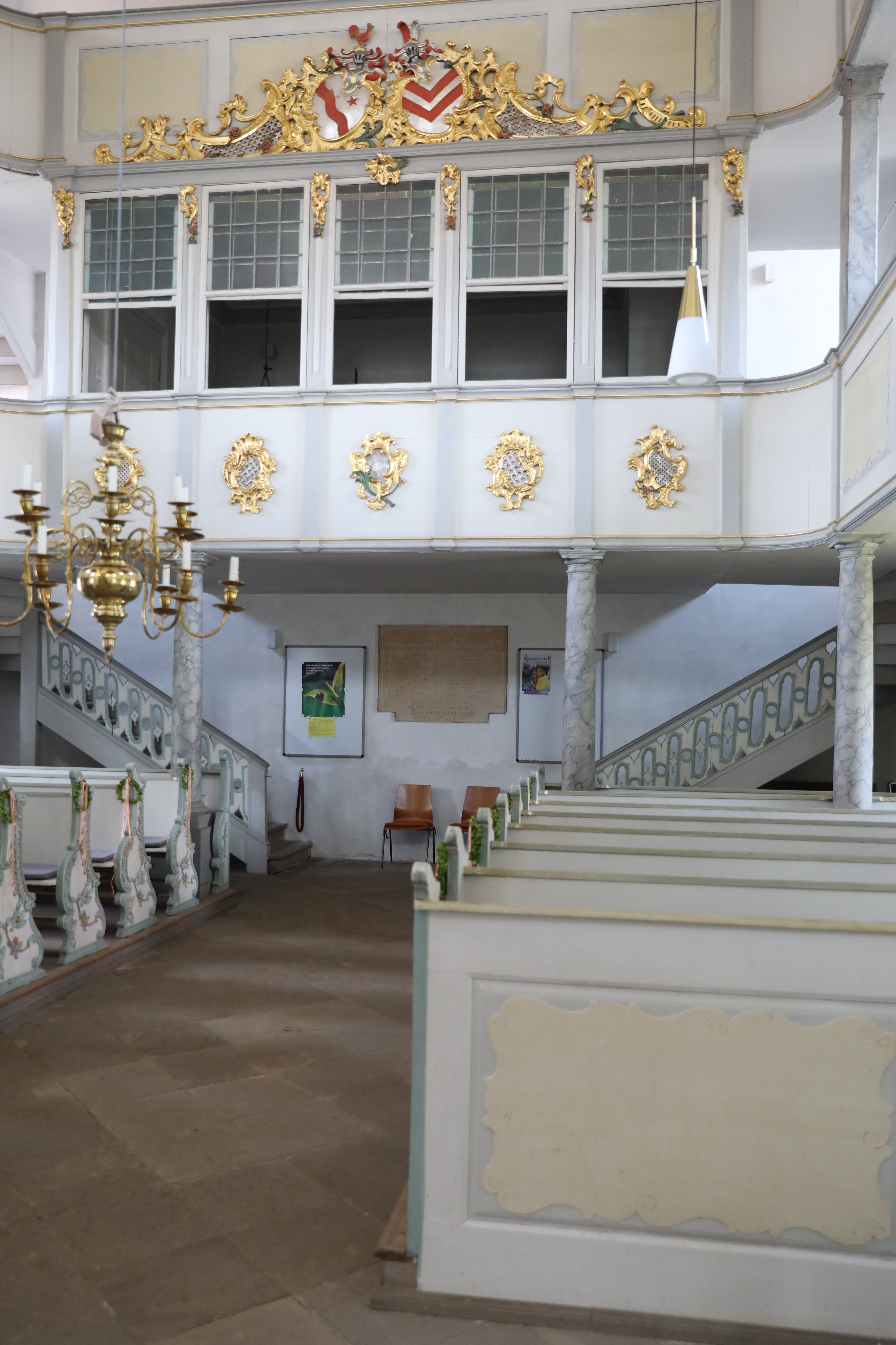 Evangelisch-lutherische Pfarr- und Schlosskirche in Fischbach